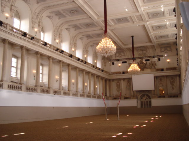 Winterreitschule Hofburg, Blick in die Reithalle